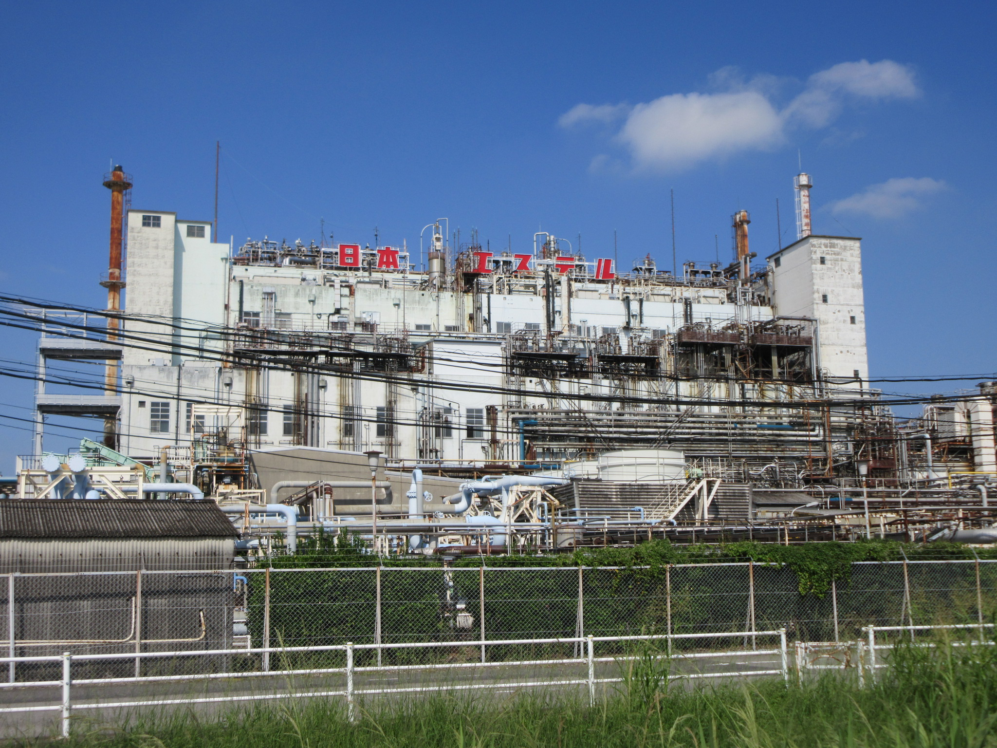 ユニチカ岡崎営業所／日本エステル岡崎工場（岡崎市日名北町）